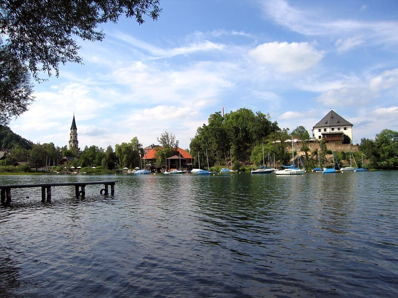 Schloss Mattsee - Bundesland Salzburg - Österreich